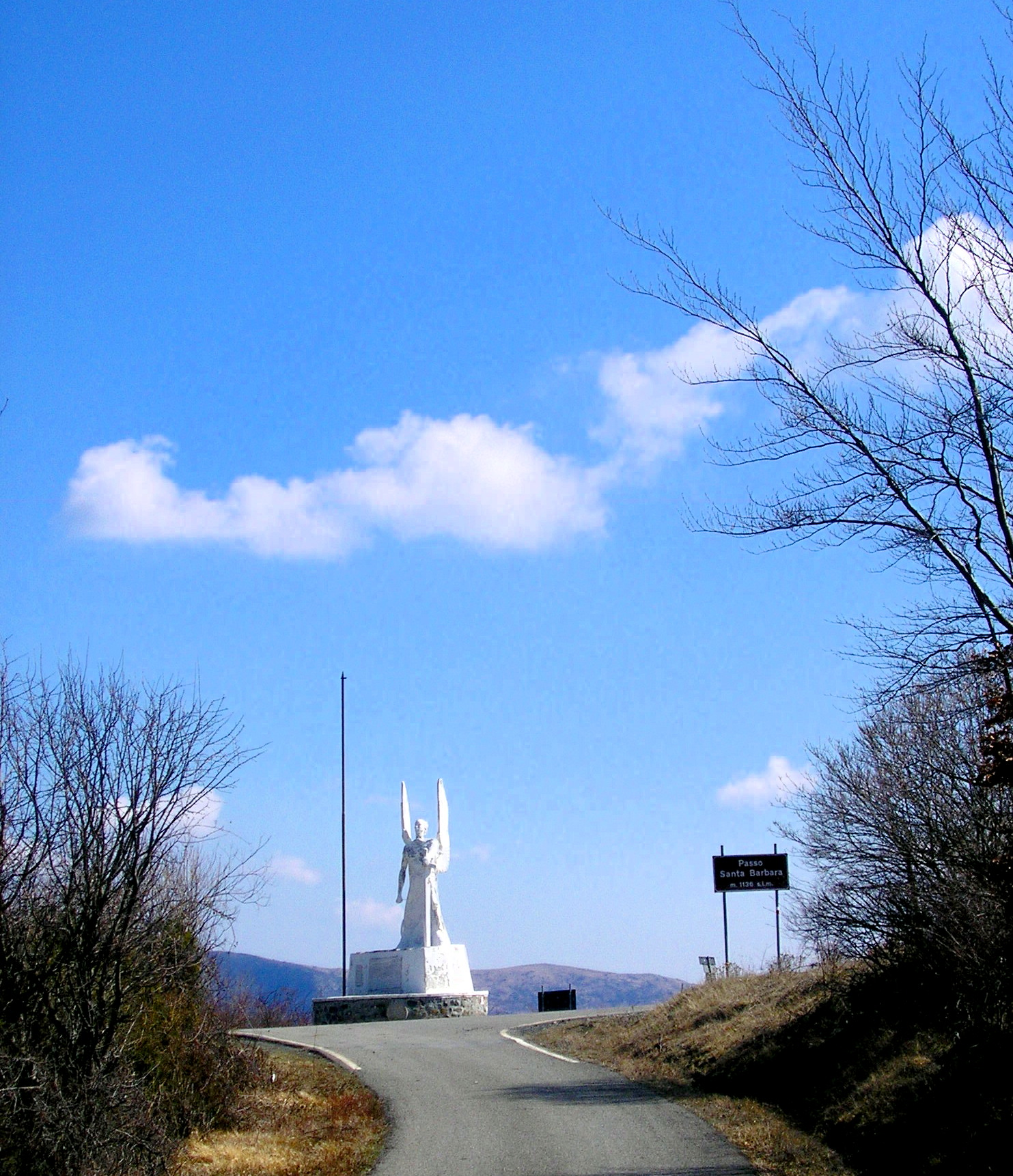 Passo S.Barbara ("L'Angelone di Coli)